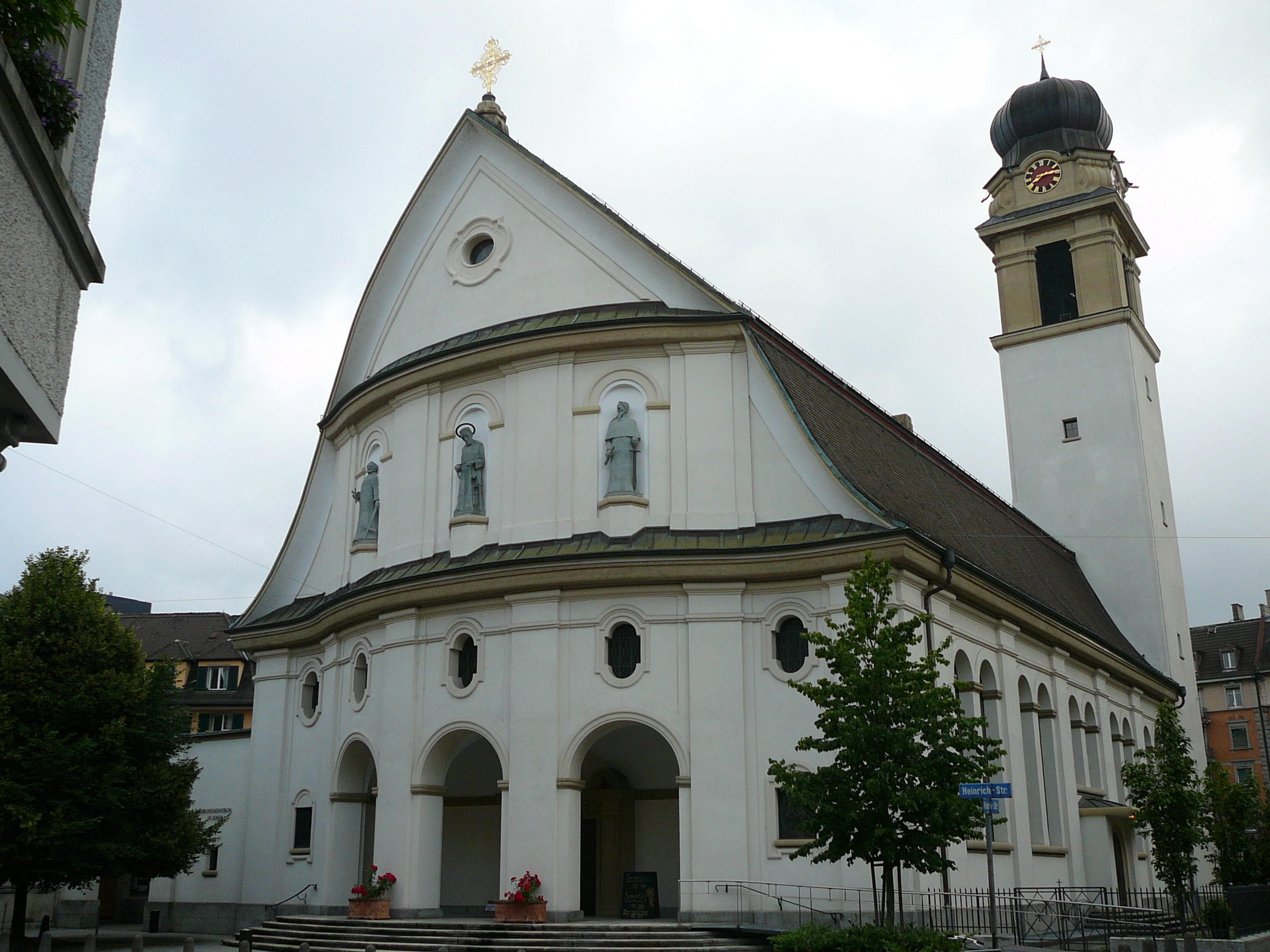 Runa Simi: Römisch-katholische Kirche St. Josef Zürich-Industriequartier, Aussenaufnahme